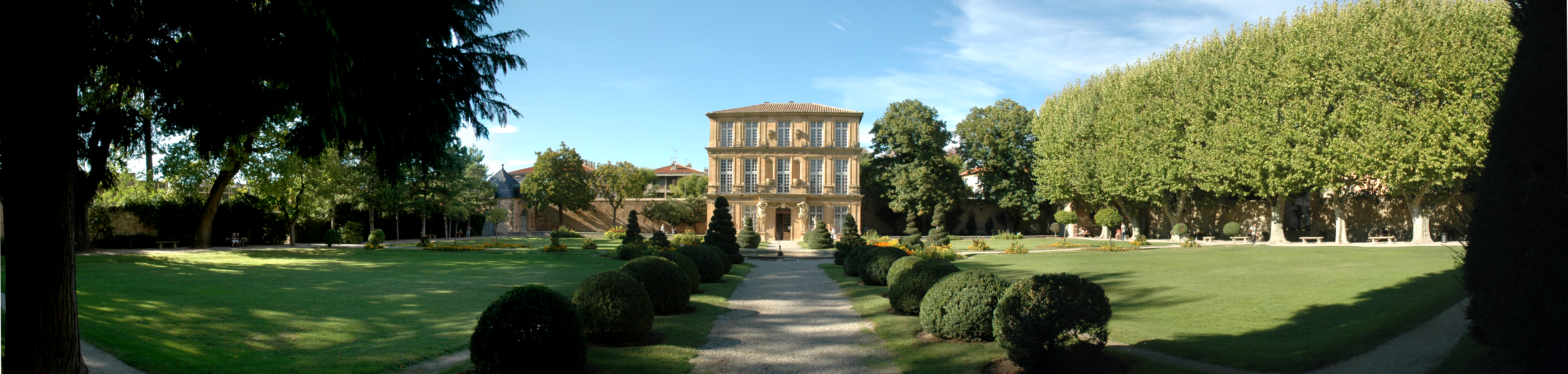 Panorama Pavillon de Vendôme et parc, Aix-en-Provence.